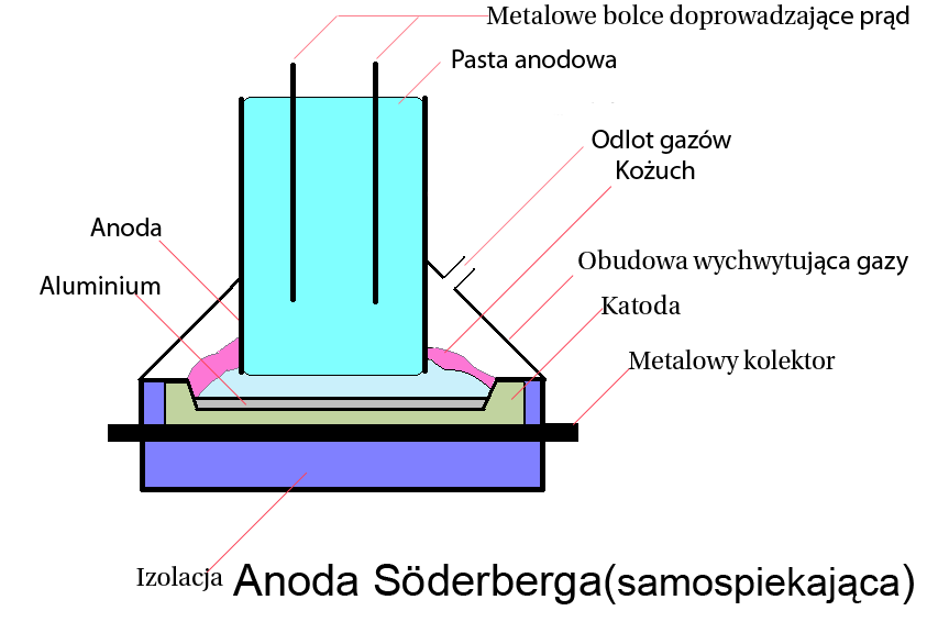 Anoda Söderberga PROCES: HALL-HÉROULT